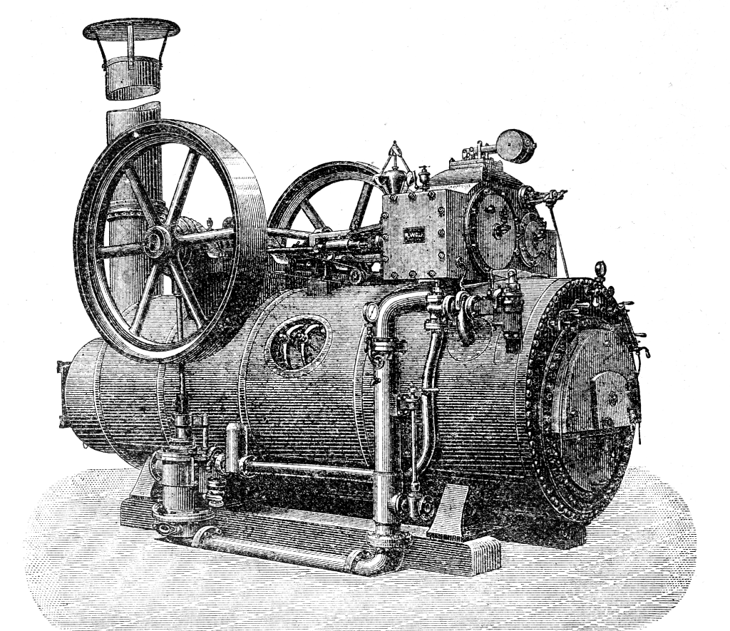 Dampfmaschine